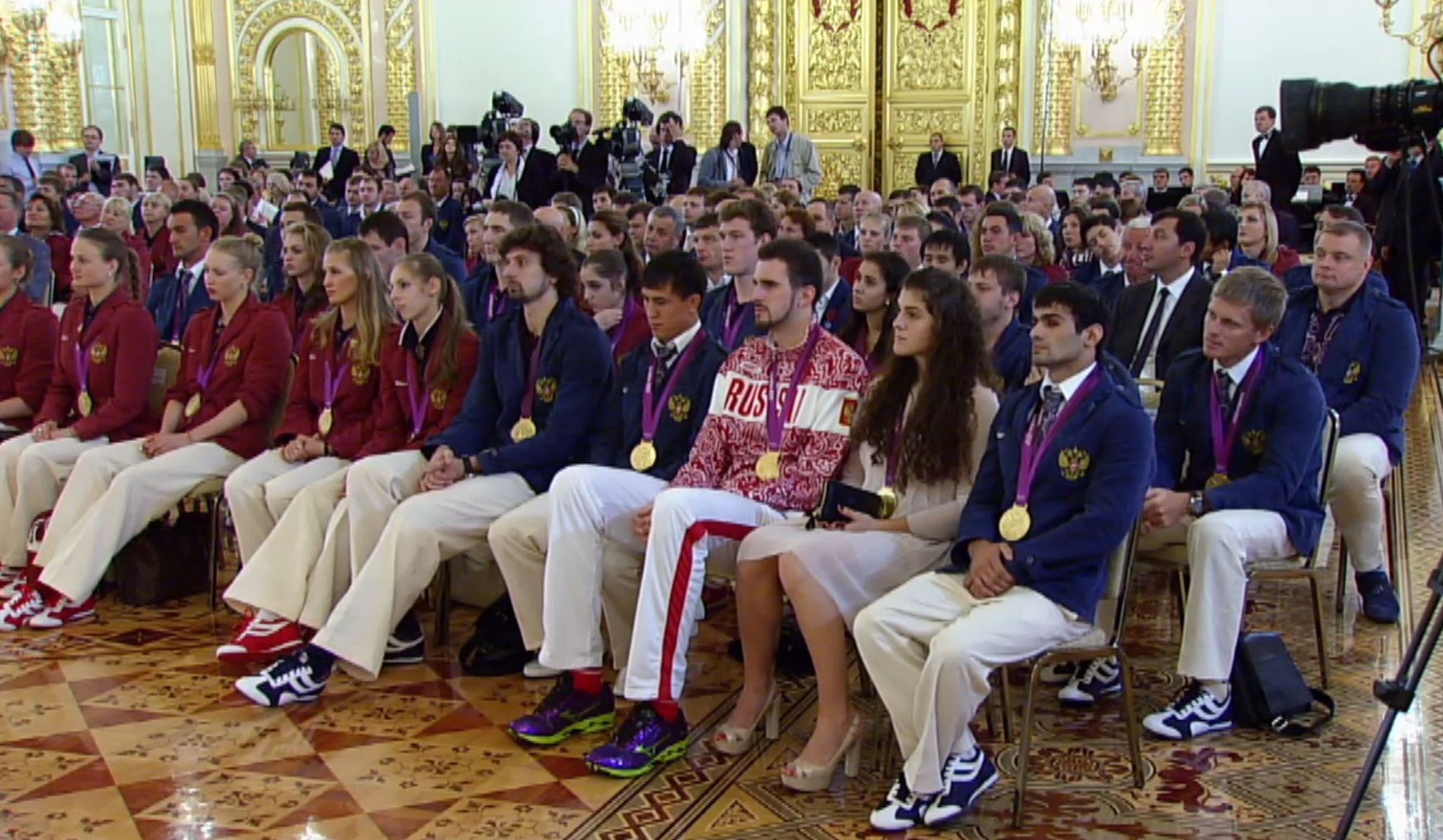 Встреча победителей и призёров Олимпийских игр 2012 года с президентом России на вручении государственных наград 16 августа 2012